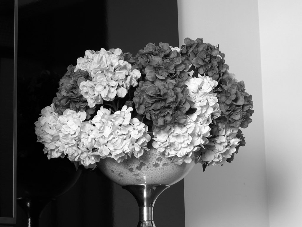 Imagem em PB